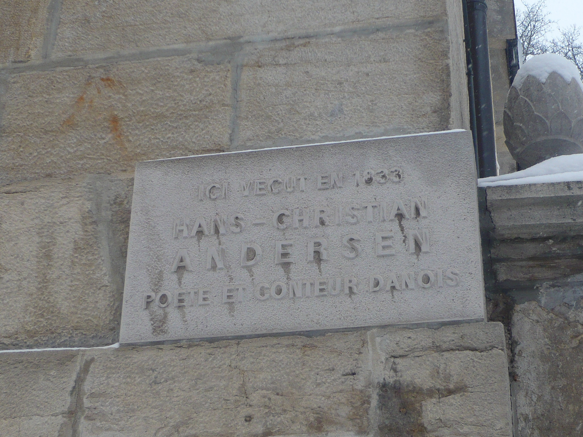 Andersen, poète danois, a séjourné dans cette maison par trois fois chez l'horloger Houriet.